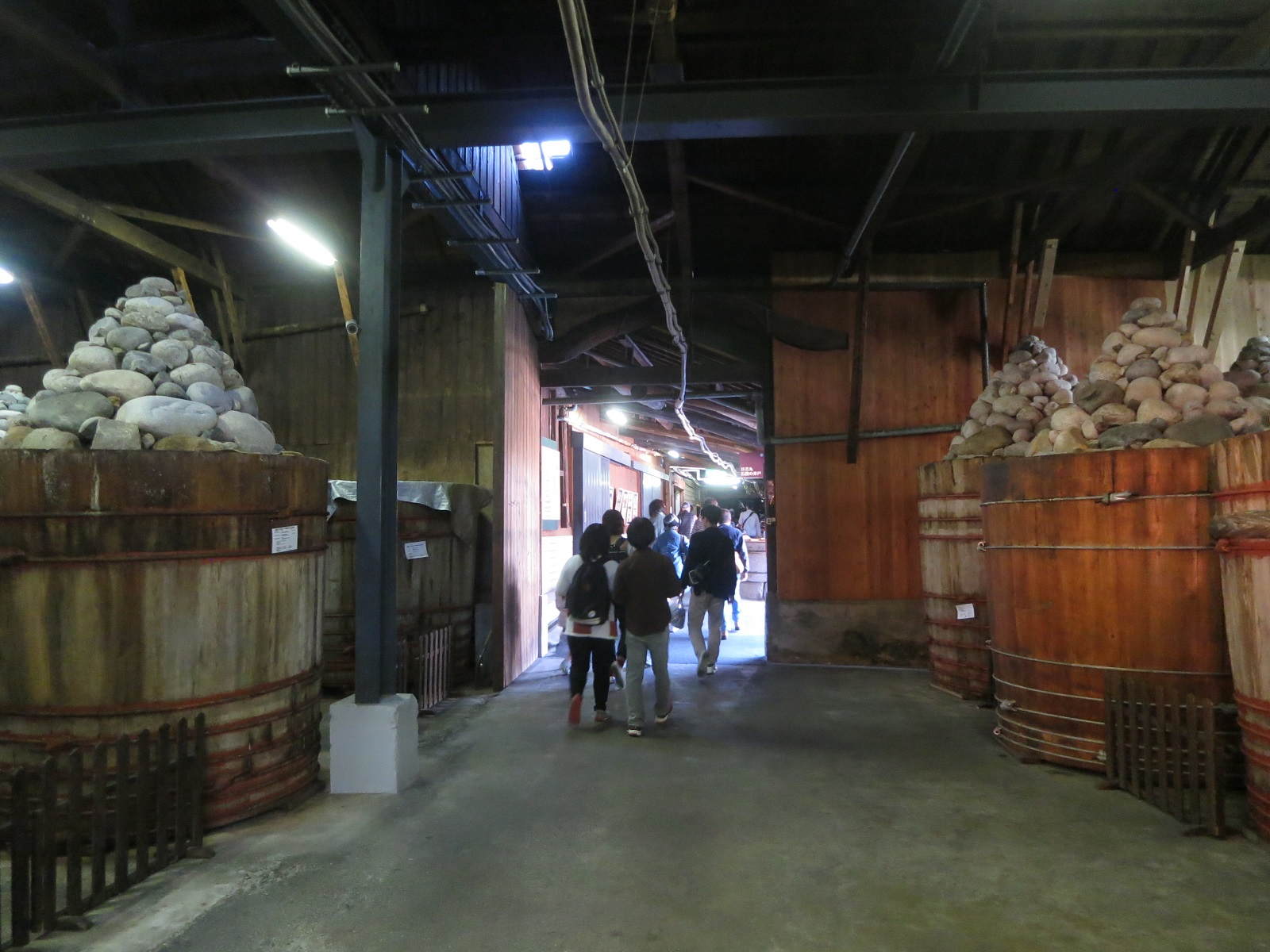 株式会社まるや八丁味噌（岡崎市八帖町）